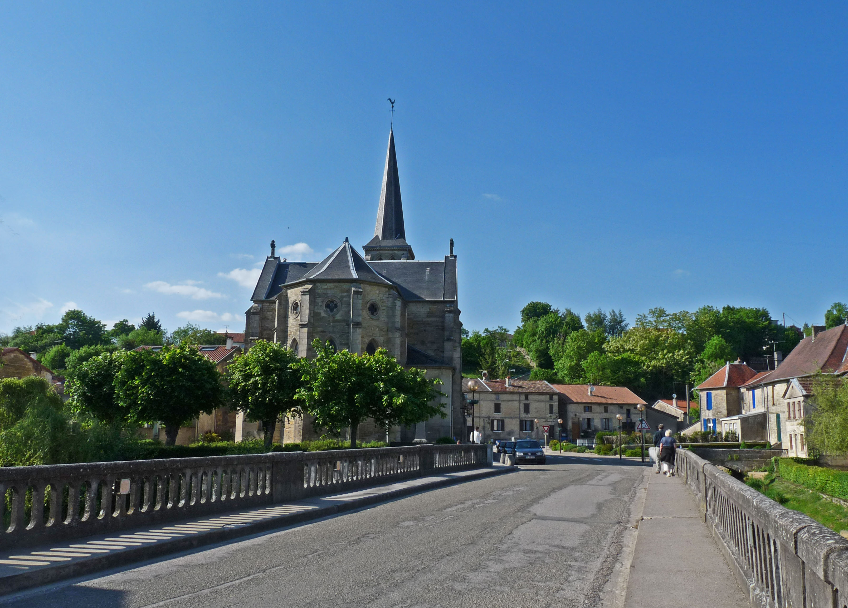 Eglise de Lisle-en-Rigault (Meuse). Pont sur la Saulx.